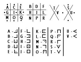 Alphabet du Pirate La Buse